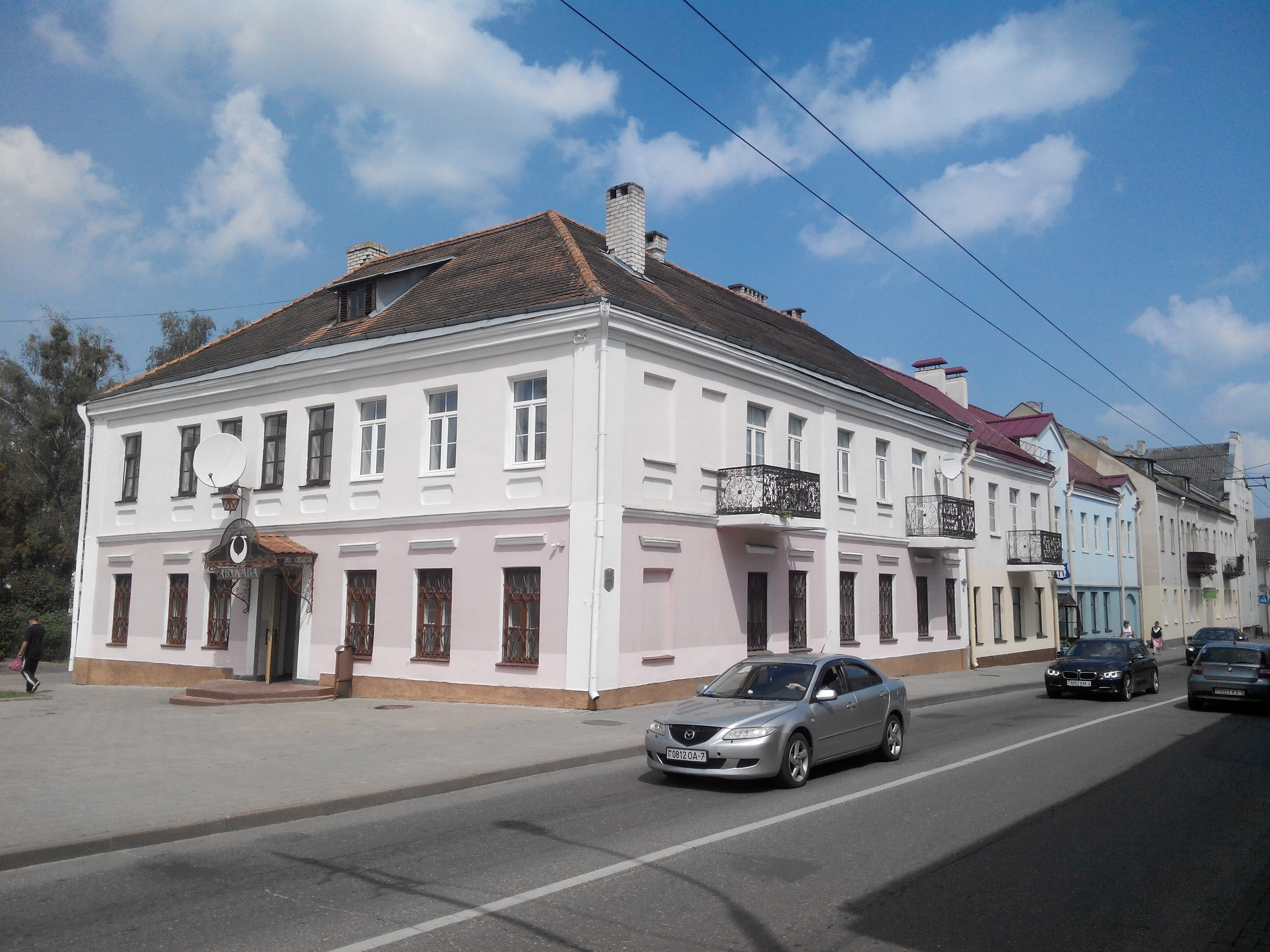 Будынак па вуліцы Вялікая Траецкая, 21, Гродна, Беларусь